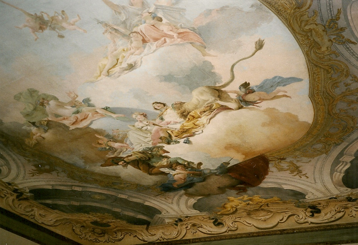 detail